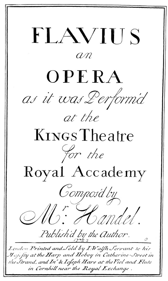 Händel, Georg Friedrich: Flavius, an opera : as it was perform’d at the Kings Theatre for the Royal Accademy / compos’d by Mr: Handel. - [Partitur]. - London : Walsh, 1723. - 64 S. Smith (1960), S. 25, Nr. 1 Eigentum des Landes Sachsen-Anhalt - im Besitz der Stiftung Händel-Haus Händels Oper "Flavio, Re de’ Langobardi" wurde am 14.05.1723 im King’s Theatre am Haymarket in London uraufgeführt. Das Libretto ist eine Bearbeitung von Nicola Francesco Haym auf der Basis von älteren Vorlagen. Historischer Kern der Handlung sind die Ereignisse um den Langobardenkönig Flavius Cunincpertus, über den in der "Historia Langobardorum" von Paulus Diaconus berichtet wird. Flavio verliebt sich in Teodate und bittet seinen Vertrauten Vitige, sich bei ihr für sie einzusetzen. Vitige und Teodate sind allerdings bereits heimlich ein Paar. Damit die Verbindung nicht herauskommt, bittet Vitige Teodate, zum Schein auf die Avancen des Königs einzugehen. Da Teodate langsam aber wirklich Gefallen an Flavio zu finden scheint, kommt es zum Streit zwischen Vitige und ihr, und ihr Verhältnis wird nun offenbar. Nachdem Flavio zeitgleich ein anderes Paar aus einer Nebenhandlung versöhnt hat, beschließt er, nun auch hier Frieden zu stiften und gibt Teodate frei. Die vorliegende Erstausgabe erschien bereits gut zwei Monate nach der Uraufführung im Verlag von John Walsh d. Ä. (ca. 1665-1736) in Zusammenarbeit mit John (1672-1725) und Joseph Hare (ca. 1700-1733). Hinter dem Titelblatt ist der Abdruck eines königliches Privilegs eingefügt, dass Händel die alleinigen Druck- und Vertriebsrechte an seinen Werken zusichert. Am Beginn jeder Arie ist der jeweilige Sänger der Uraufführung genannt (Margherita Durastanti, Anastasia Robinson, Francesca Cuzzoni, der Kastrat Senesino, Giuseppe Maria Boschi, Gaetano Berenstadt und Alexander Gordon). Die Seiten 12/13, 48 und 53 sind am unteren Rand stark beschnitten mit geringem Textverlust (Generalbassbezifferung, Vorzeichen).